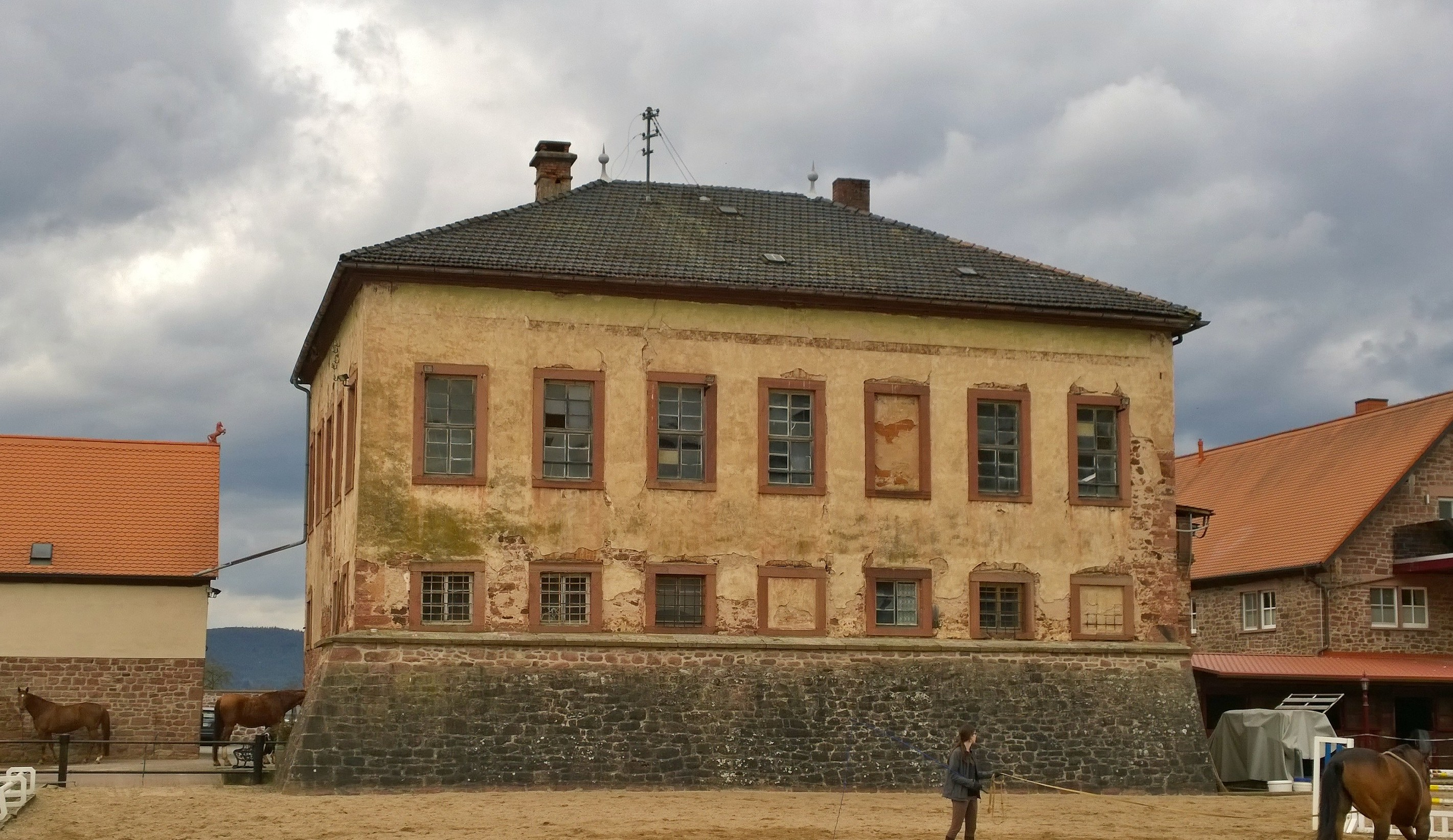 Schloss Rodenbach: Lohr am Main - Rodenbach, ehemaliges Schloss, (Rückansicht)